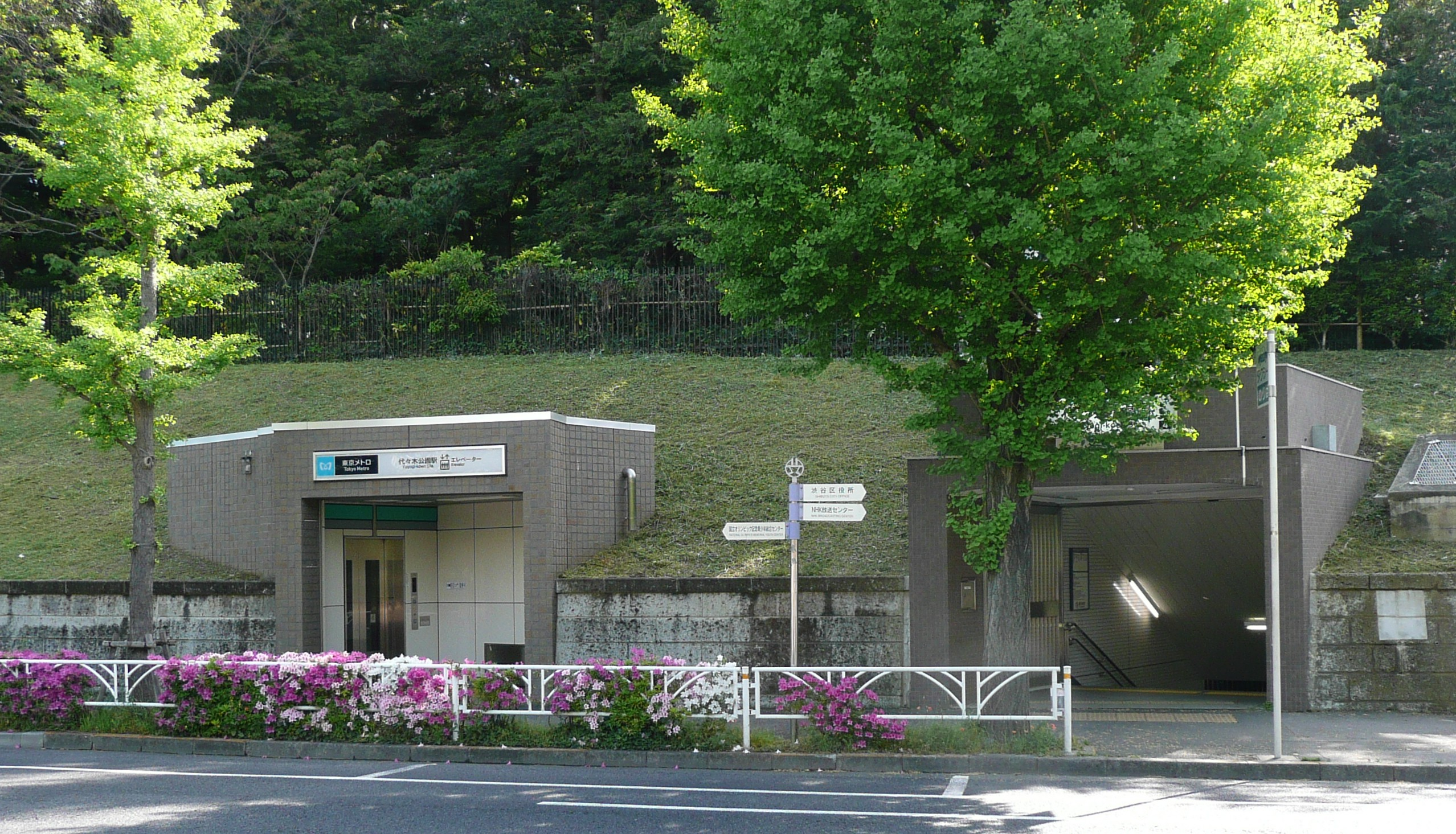 代々木公園駅4番出入口